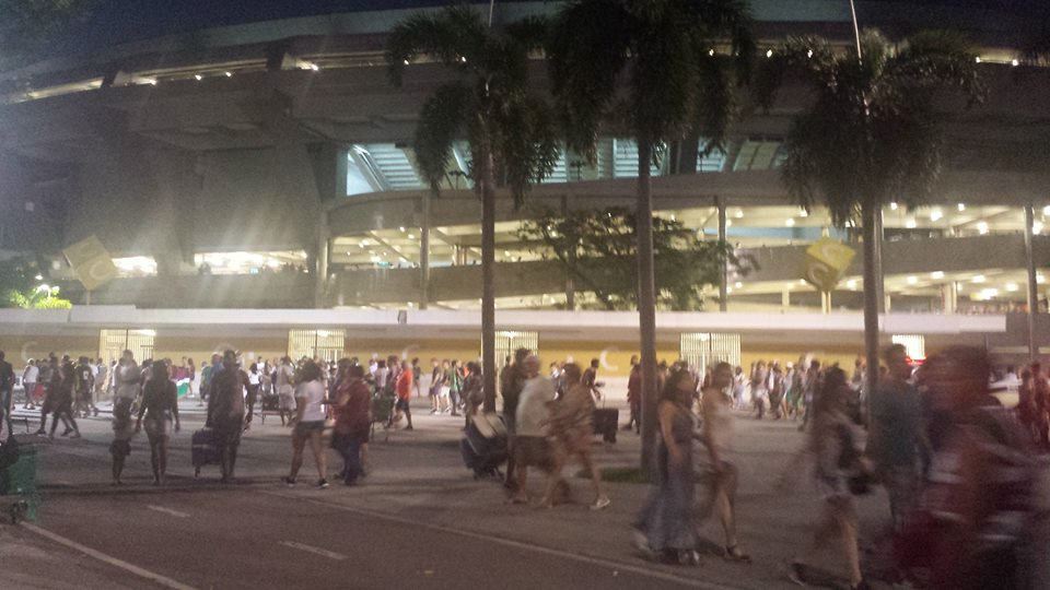 Estádio do Maracanã em jogo do Fluminense contra o São Paulo em 29/04/2018.